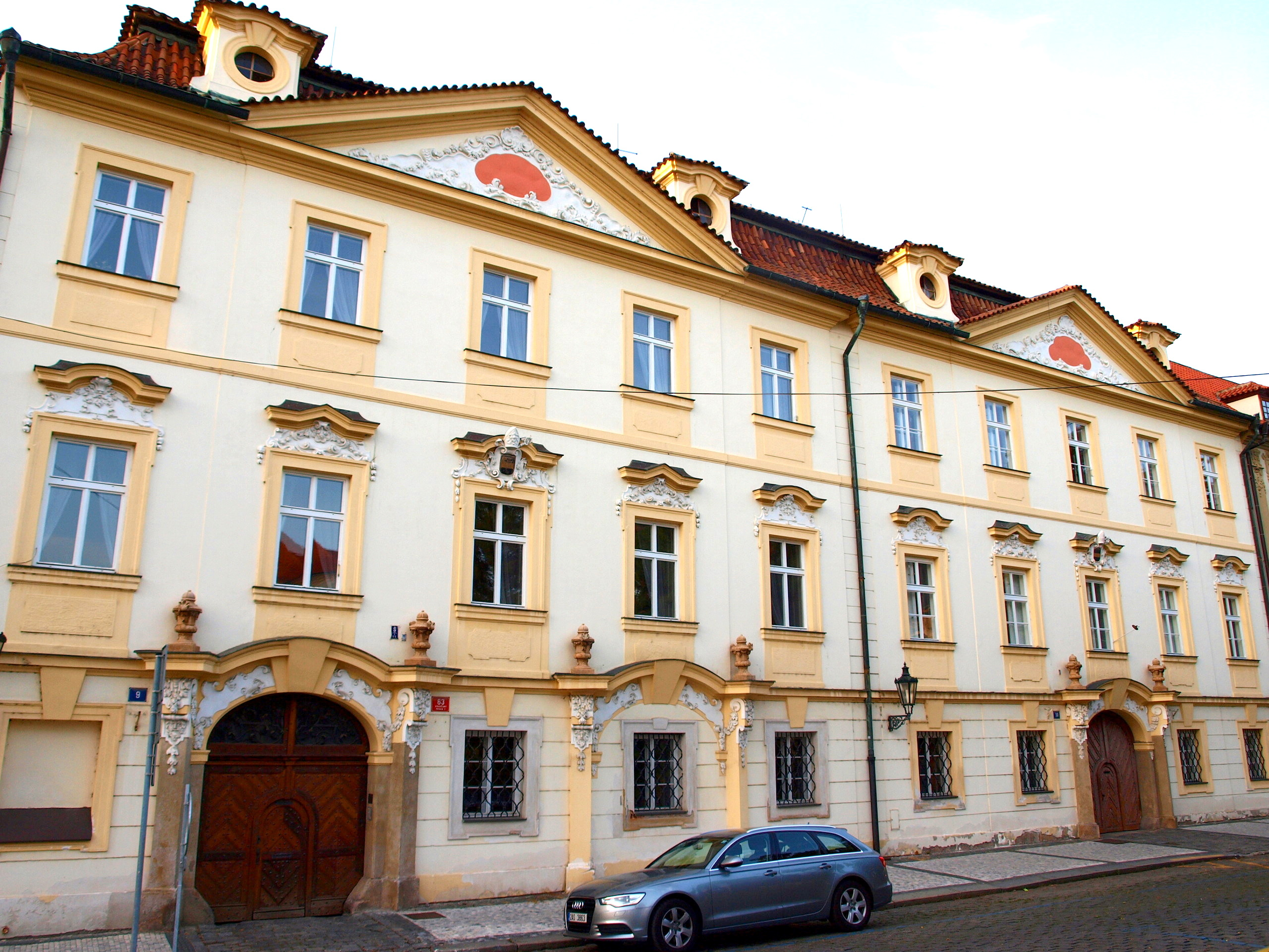 Sasko-lauenburský palác